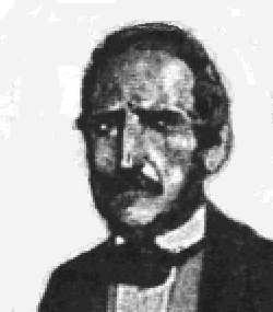 единственное изображение итальянского композитора Раймондо Бушерона (1800-1876)